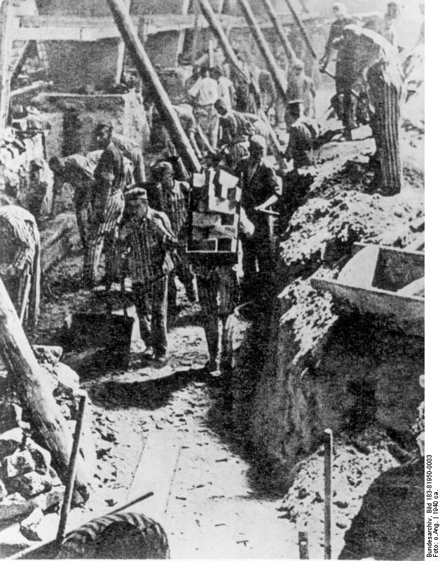 Zentralbild 8.4.1961 Zur Einweihung der Mahn- und Gedenkstätte Sachsenhausen am 23. April 1961. - Vor den Toren Berlins, auf dem Gelände des ehemaligen faschistischen Konzentrationslagers Sachsenhausen bei Oranienburg, in das von 1936 bis Kriegsende 200.000 Menschen verschleppt wurden, entsteht - wie in Buchenwald und Ravensbrück - eine würdige Mahn- und Gedenkstätte. Jeder Quadratmeter Boden ist hier vom Blut der 100.000 Toten durchtränkt, die im KZ Sachsenhausen mit seinen 73 aussenkommandos erschlagen, erhängt, erschossen, zu Tode geprügelt, durch erbarmunslose Sklavenarbeit zu Grunde gerichtet und vergast wurden. Doch gelang es den SS-Mördern nicht, den Widerstandswillen der politischen Häftlinge zu brechen. So wurde Sachsenhausen auch zur Stätte der großen internationalen Solidarität und des mutigen Kampfes gegen Faschismus und Krieg. UBz:Ein besonders mörderisches Arbeitskommando war das SS-Klinkerwerk. Maurer-Kolonnen bei ihrer zwölfstündigen schweren Arbeit unter den härtesten Bedingungen von Antreiberei und Hunger.